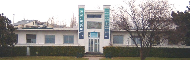 Aquarium du Lac du Bourget présent dans la ville d'Aix-les-Bains en France dans le département de la Savoie.